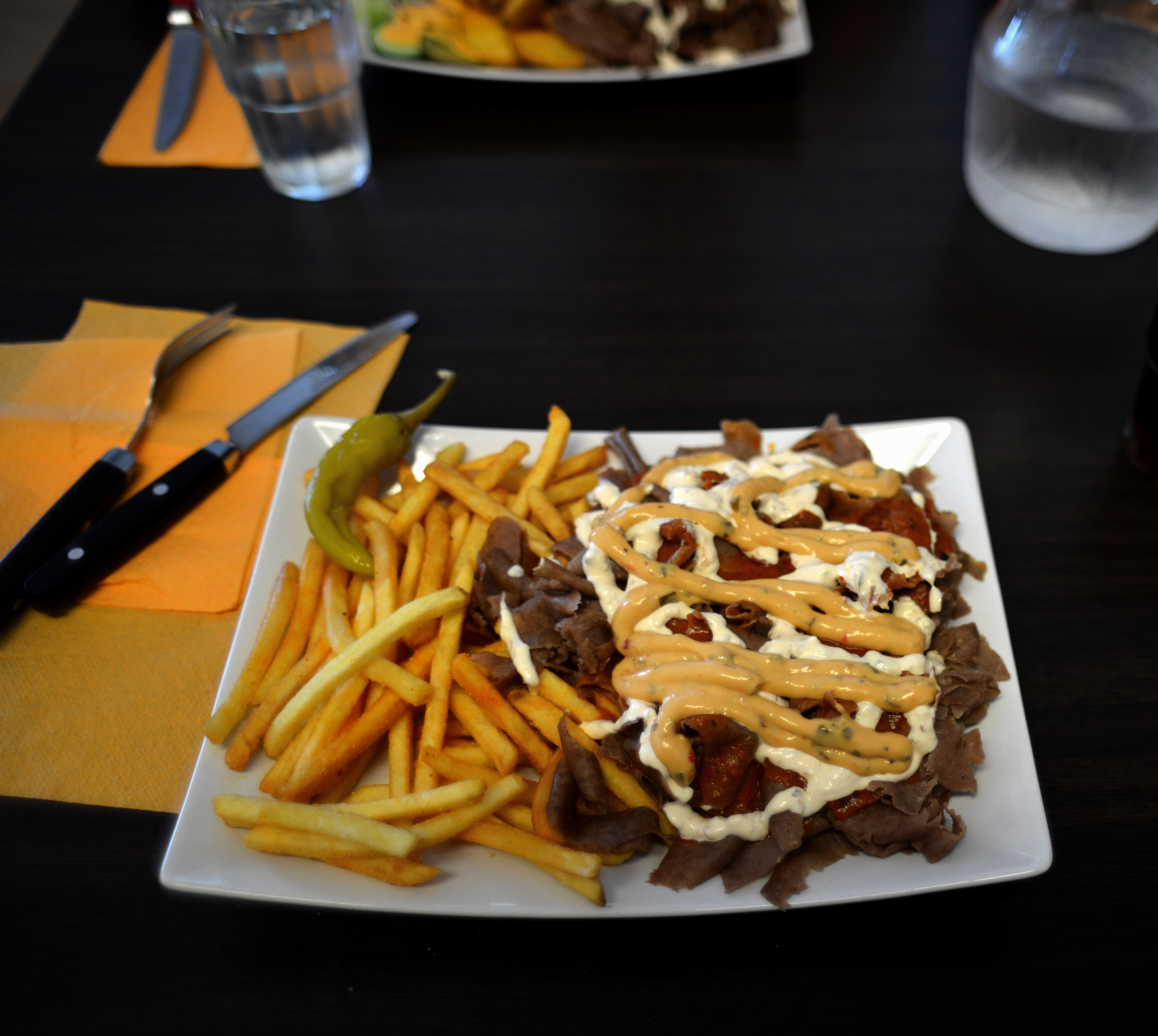 Kebab ranskalaisilla perunoilla, Alastaro, heinäkuu 2017